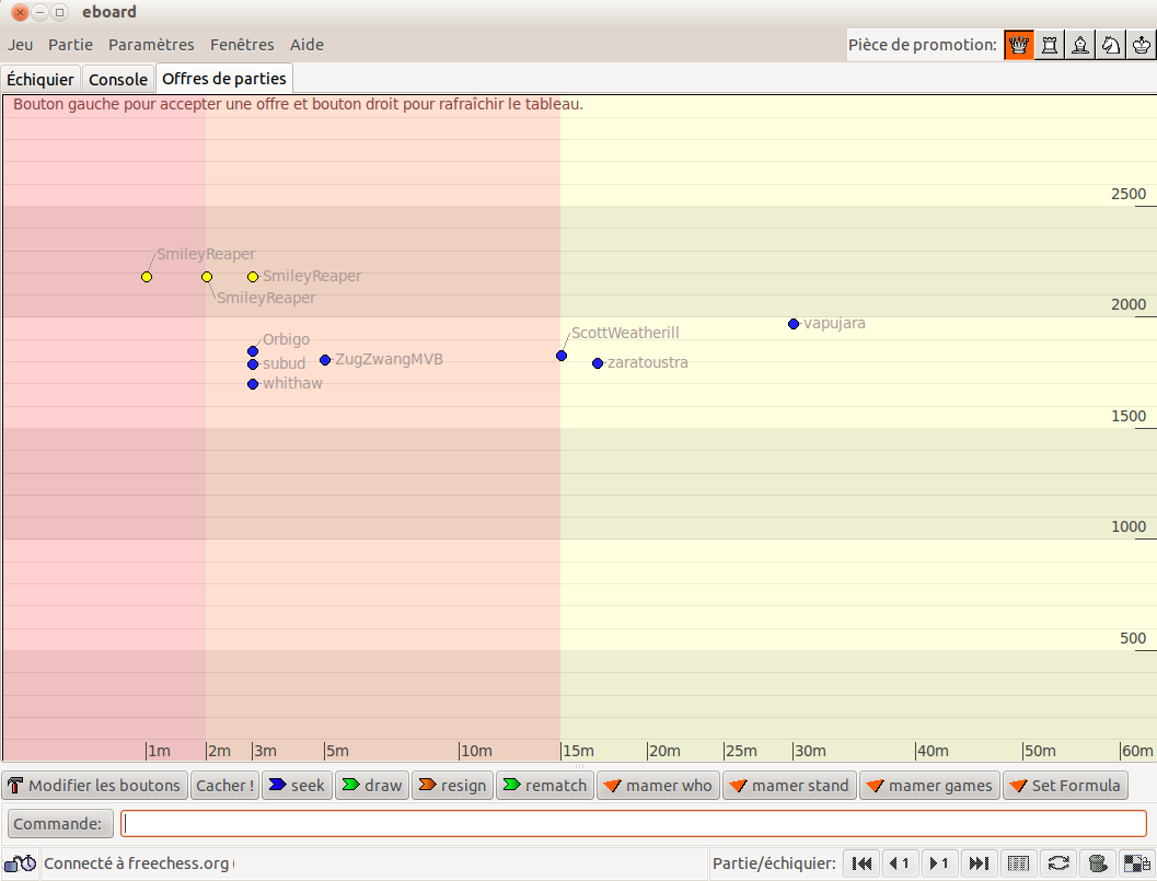 Capture écran de eboard / fenêtre défis - challenges